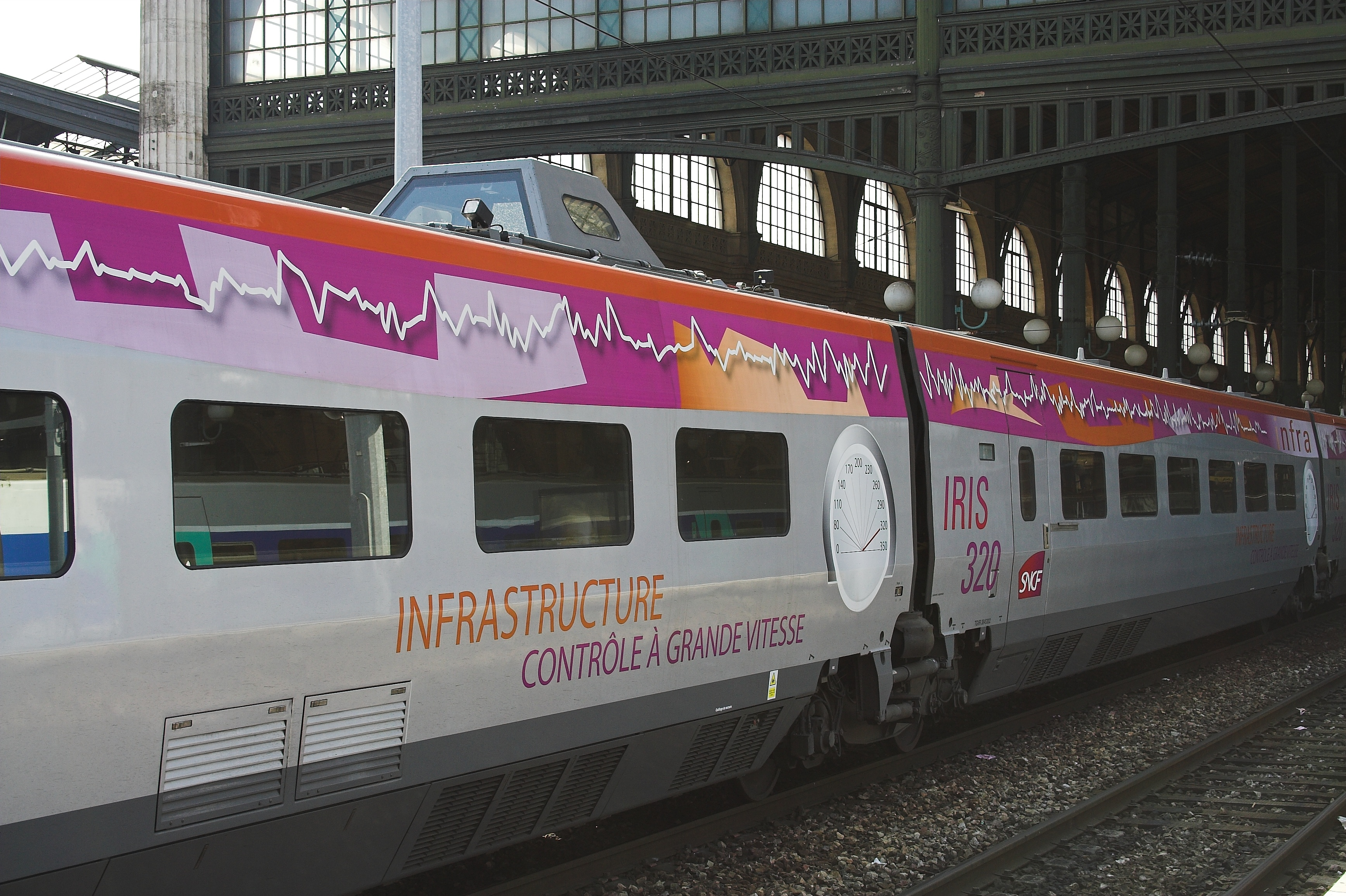 IRIS 320(Gare du Nord, France)